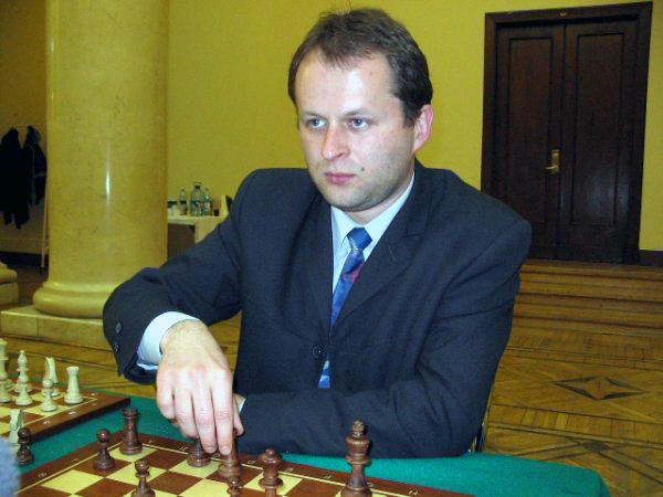 Artur Jakubiec, Warsaw 2004